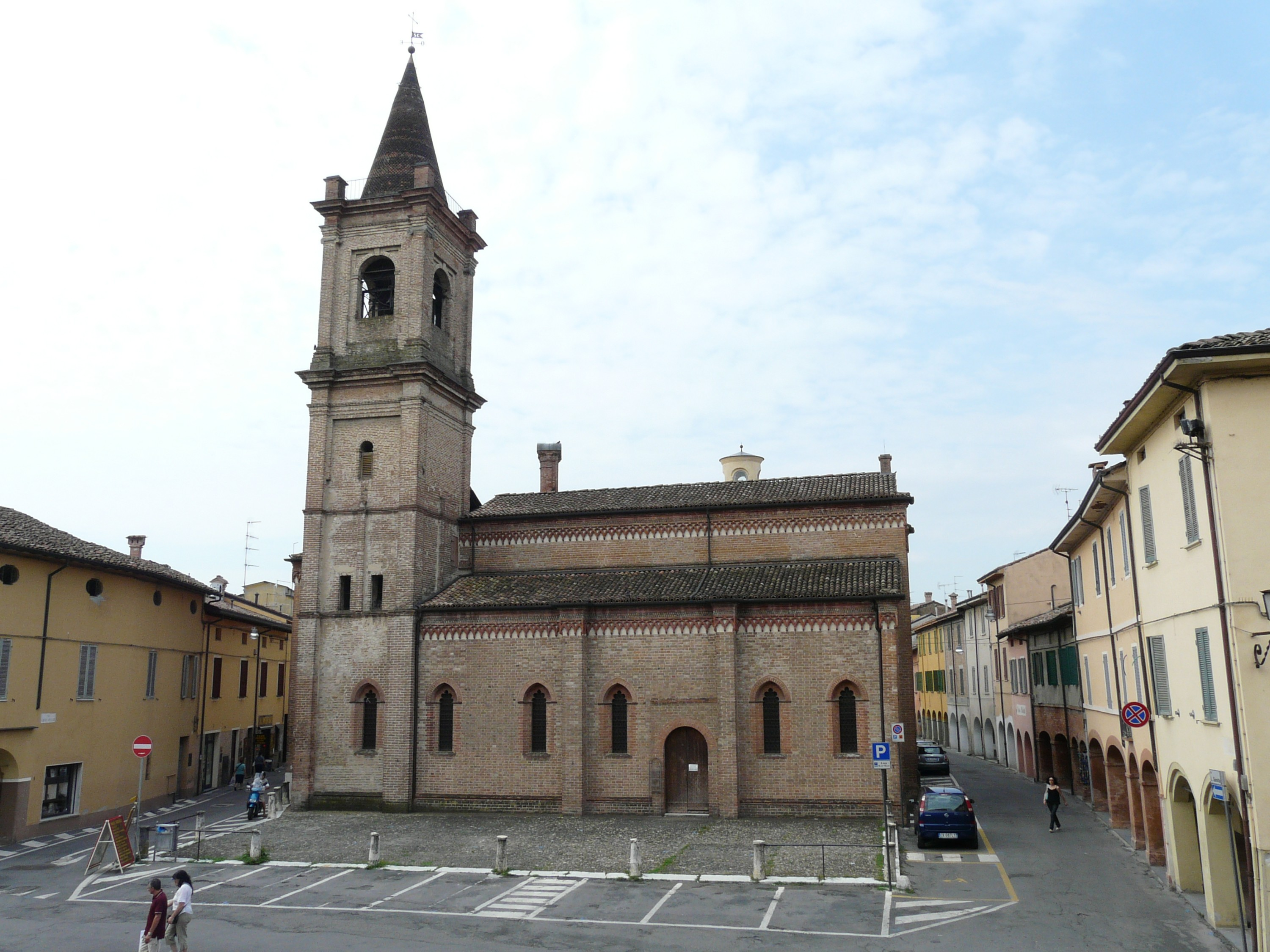 Immagini della chiesa di Santa Croce di Fontanellato, Emilia-Romagna, Italia